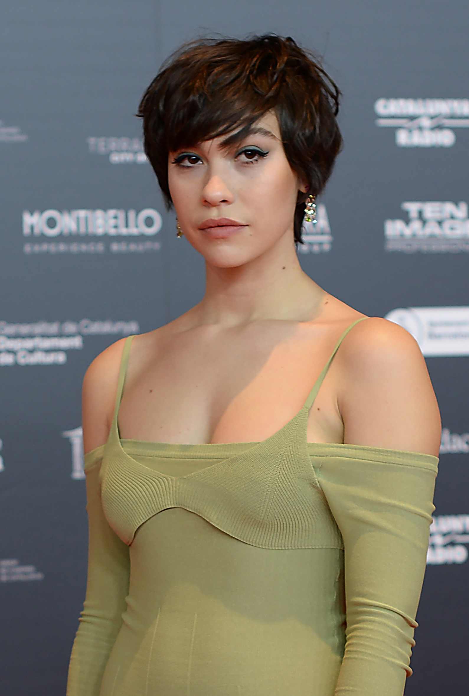 Greta Fernández, actriu, XII Premis Gaudí (2020)